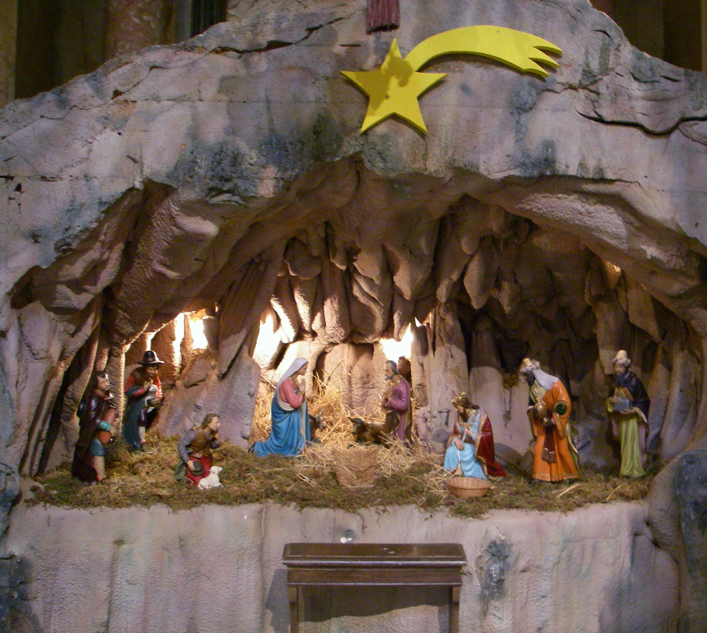 Convento de Mafra This file was uploaded for Wiki Loves Monuments in Portugal with the unique identifier 69940.